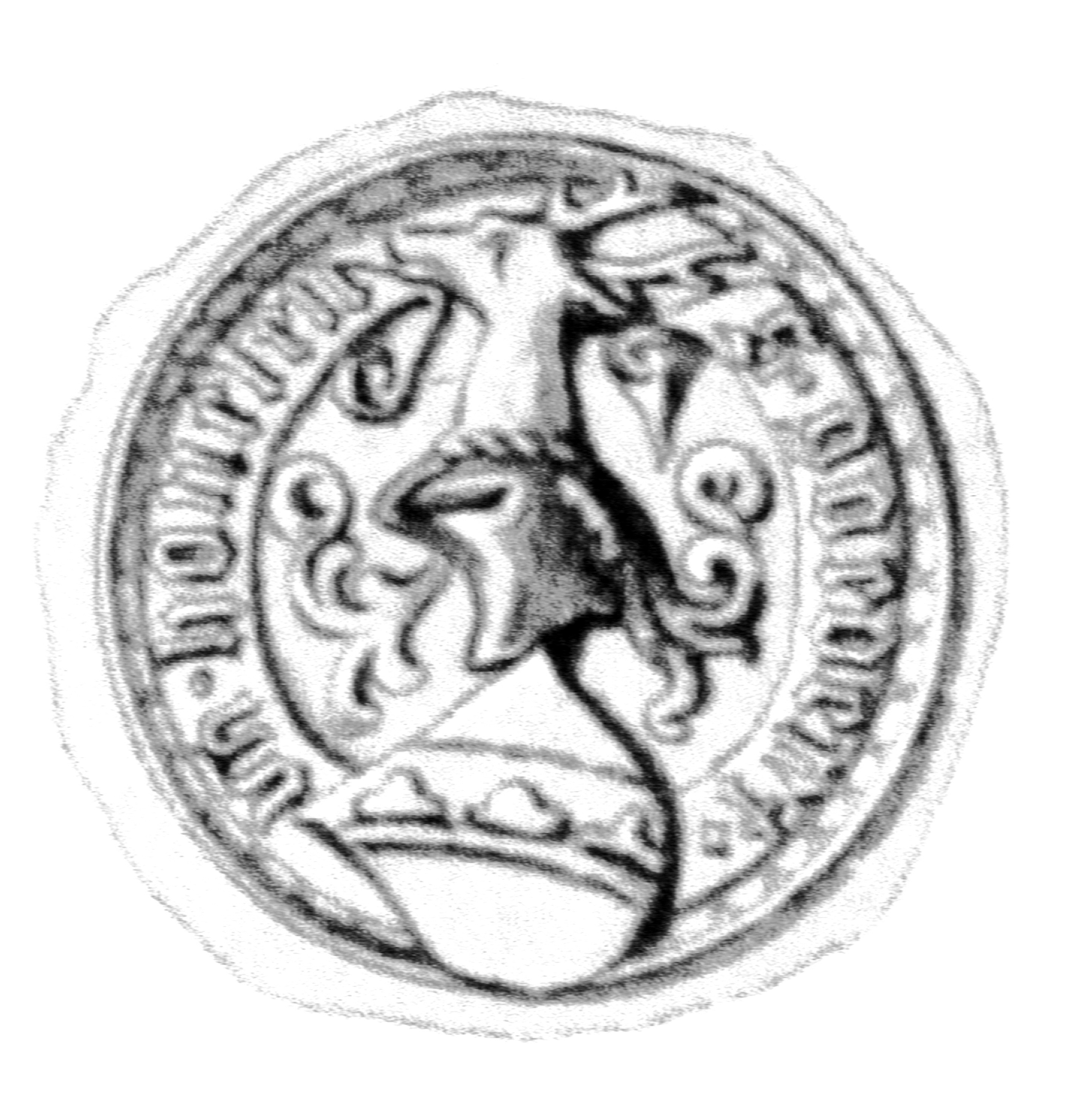 Siegel des Ratsmannes Goedert van Hovelen. Das Siegel stammt aus der Zeit um 1544. Siehe Emil Ferdinand Fehling: Lübeckische Ratslinie, Nr. 615 (Gotthard von Hoeveln, BM).